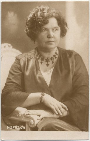 Photo de poète et dramaturge lettonne Elza Pliekšāne (née Elza Rozenberga) dite Aspazija faite par un inconnu en 1920. Portrait 13,5x8,5 cm